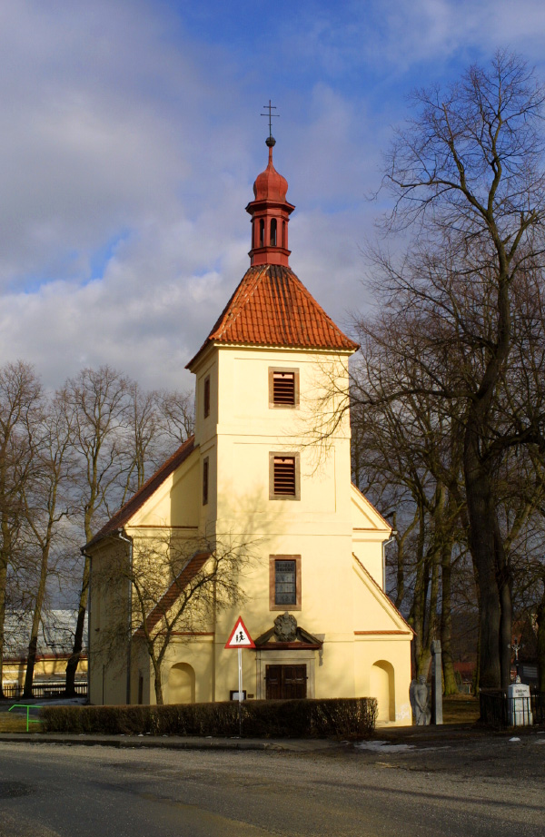 Kostel Archanděla Michaela v Oboře.